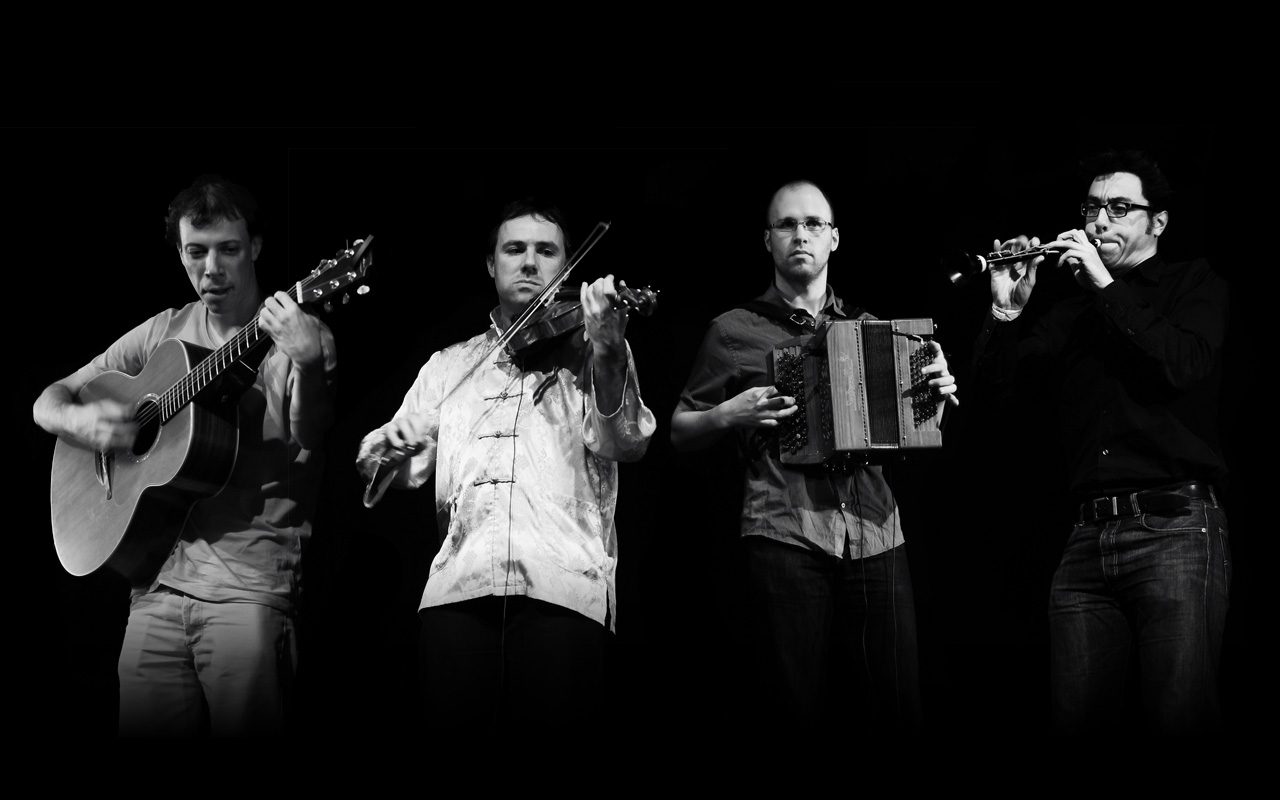 Kafe Koefet, Groupe de musique bretonne